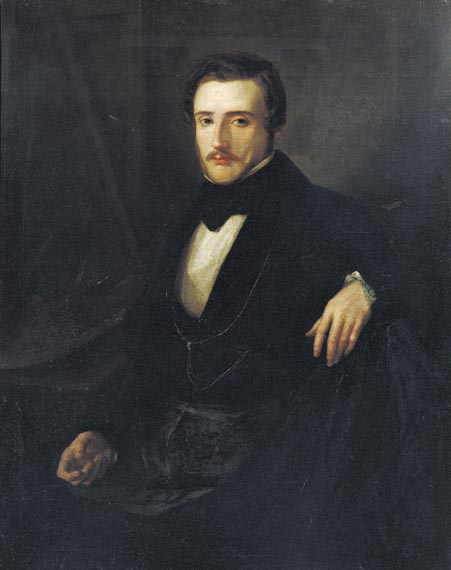 Retrato de Luís Rigalt (1840)